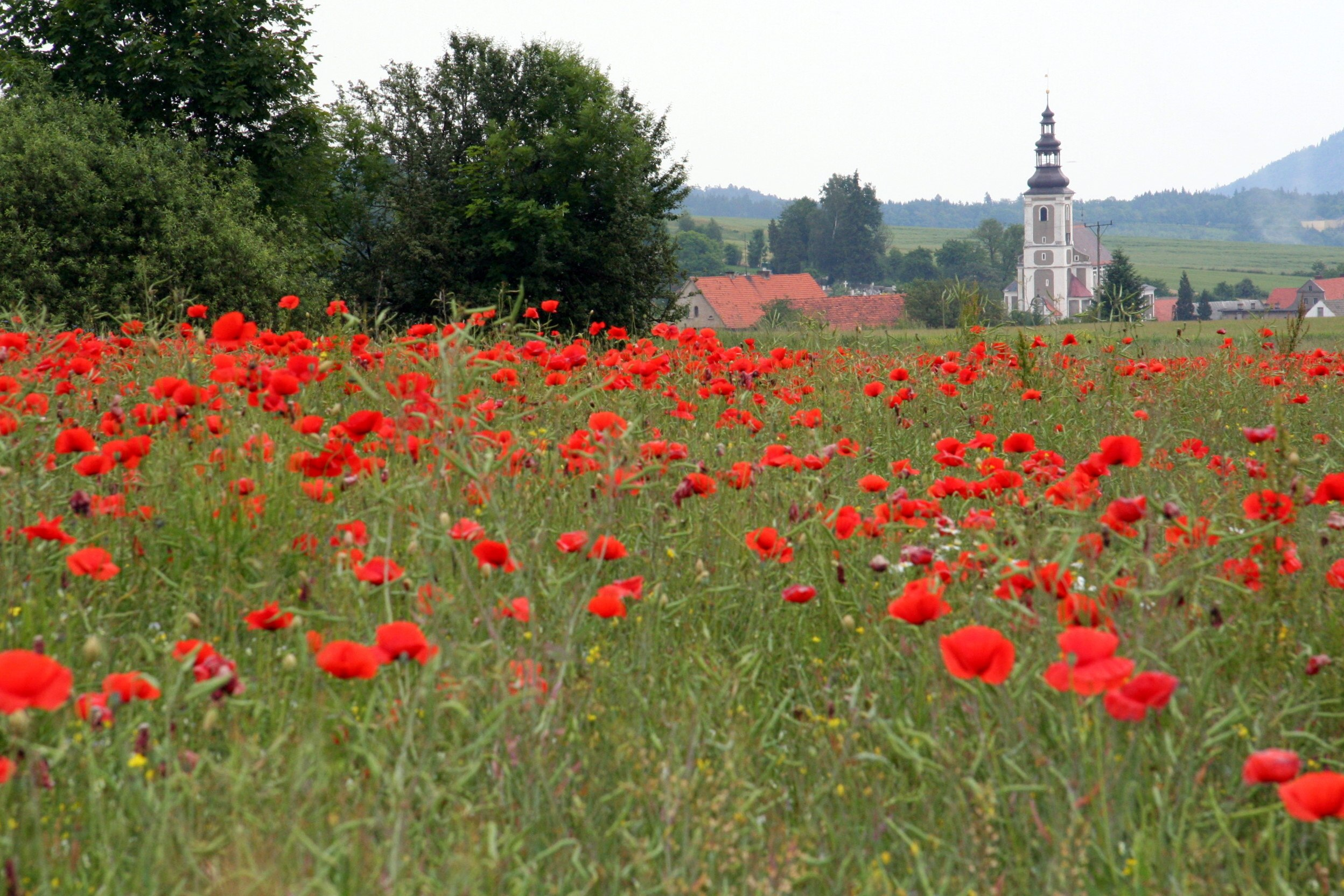 Wojbórz - kościół